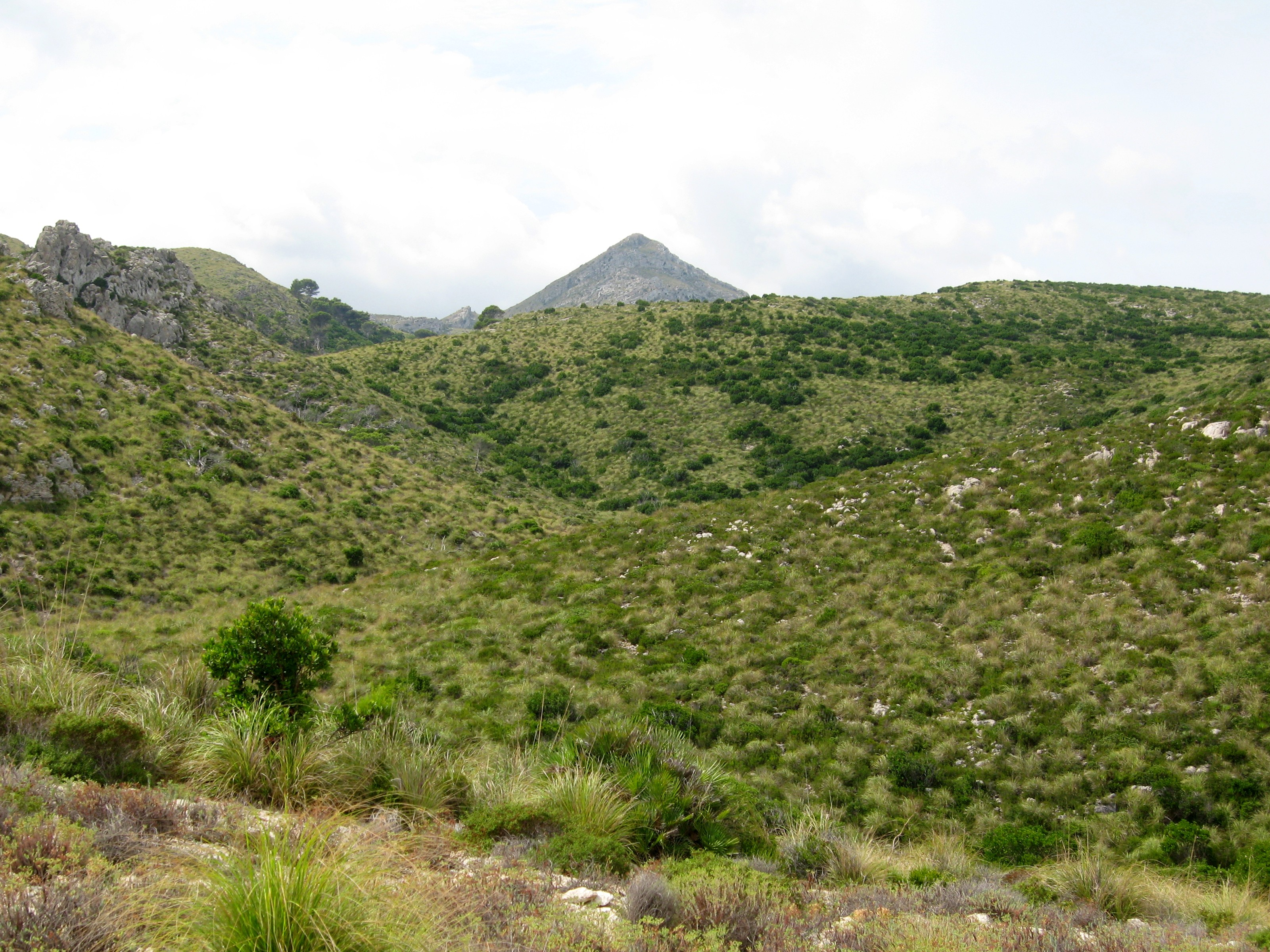 Blick über das Landgut Aubarca (Albarca) auf den 561 Meter hohen Berg Puig Morei mit dem Turm sa Talaia Freda südlich des Cap de Ferrutx an der Nordostküste von Mallorca, Spanien